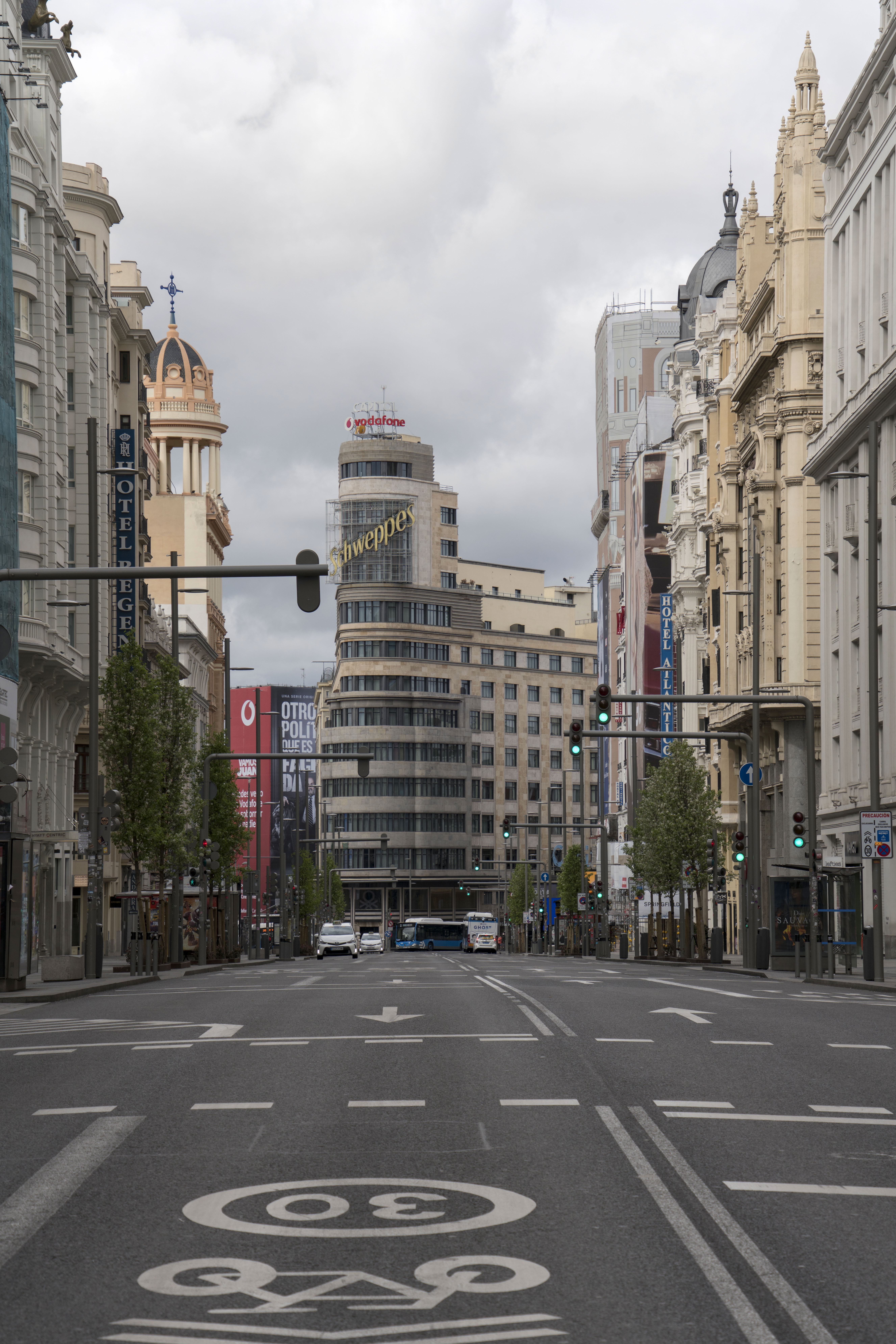 Gran Vía, Madrid, 22 de marzo, una semana de cuarentena.